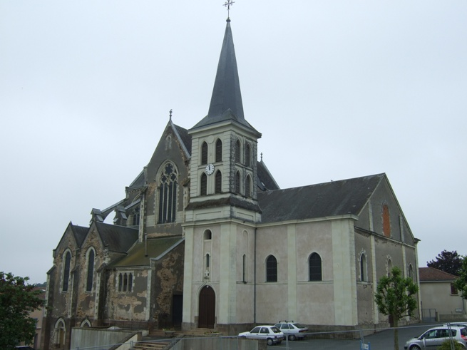 Église Saint-Pierre-aux-Liens de Gesté dans le Maine-et-Loire (France).